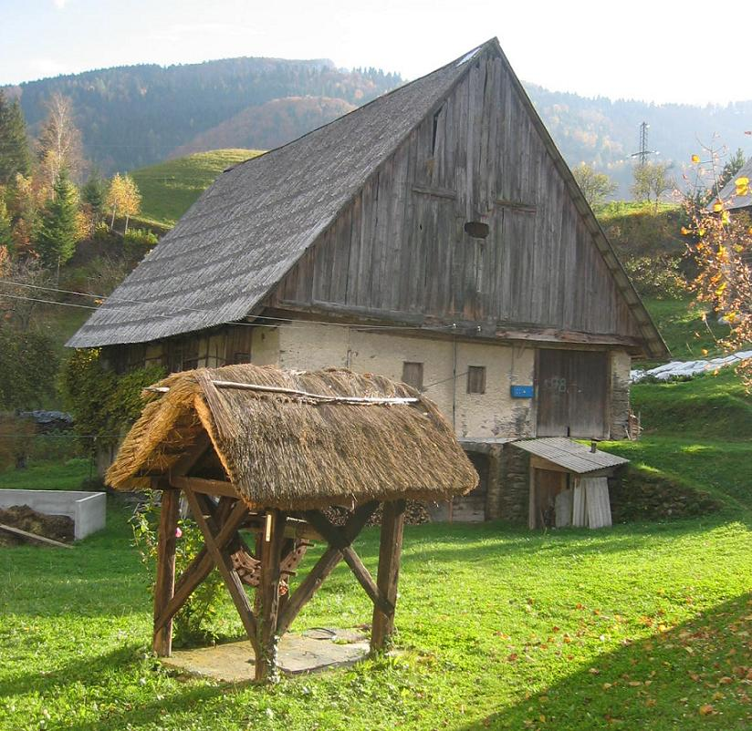 Čarjeva štirna (ethnological well), Dolenji Novaki near Cerkno. photo:Ziga 18:42, 29 October 2006 (UTC)